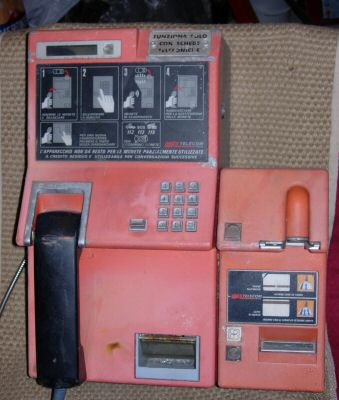 Il telefono pubblico Rotor, prodotto dalla URMET per conto della SIP